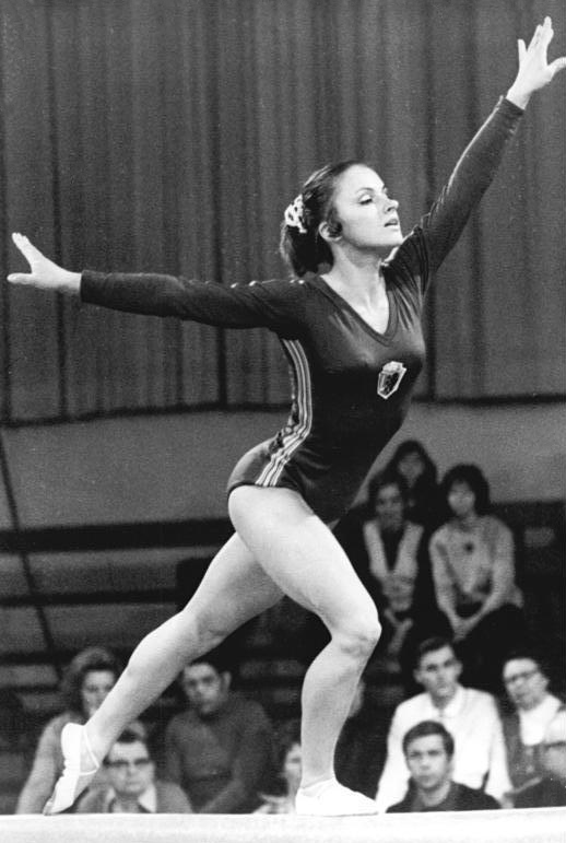 Erika Zuchold ADN-ZB Liebers-22-4-72 Gera: DDR-Meisterschaften im Turnen - Die zweifache Weltmeisterin Erika Zuchold (SC Leipzig - hier am Schwebebalken) gehört nach wie vor zu den leistungsstärksten DDR-Turnerinnen.